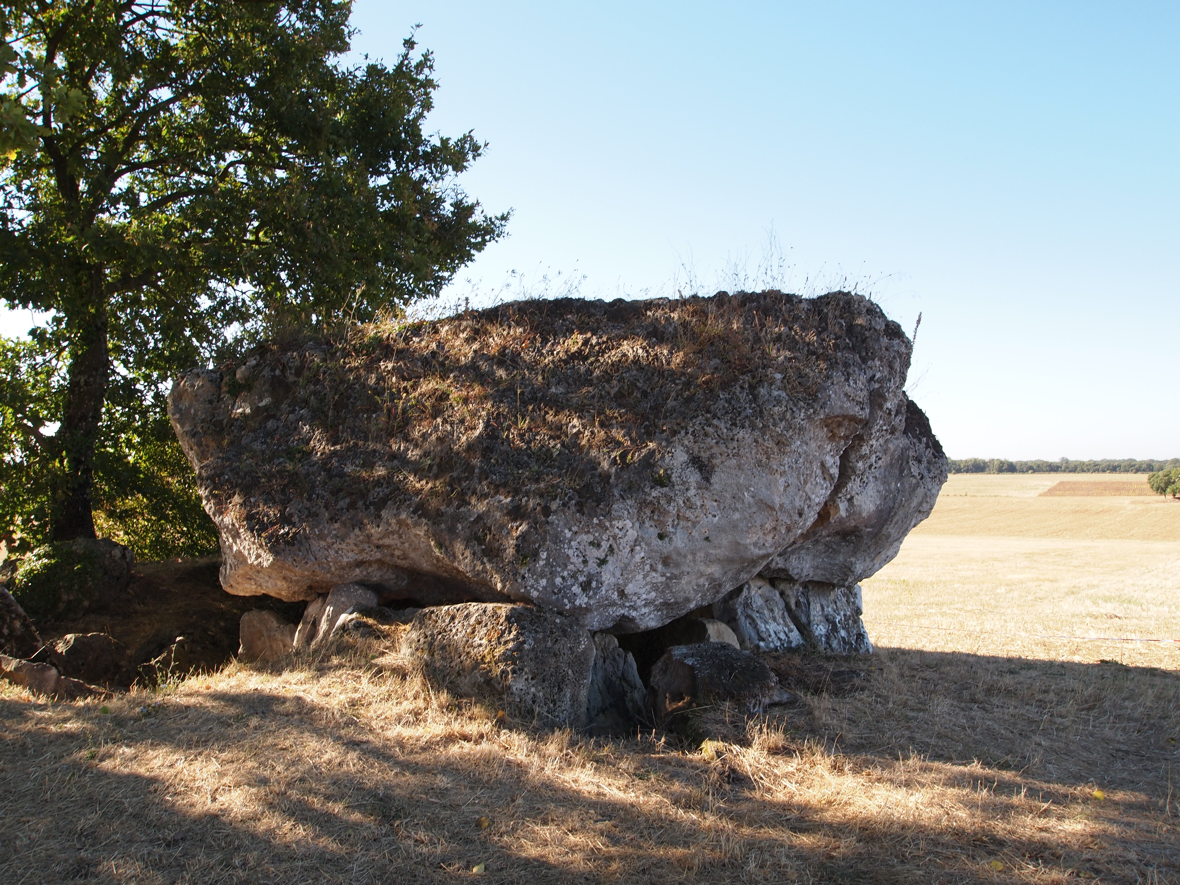 Tumulus de la Folatière, à Luxé en Charente (classé, 1957)